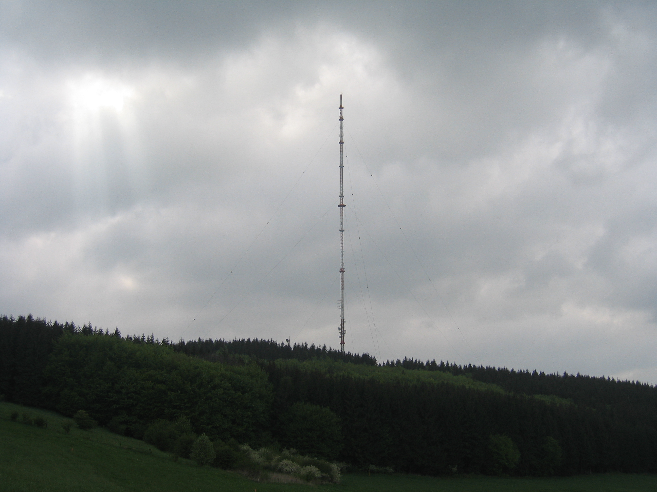 Ansicht des Sendeturmes auf dem Scharteberg aus gewisser Nähe